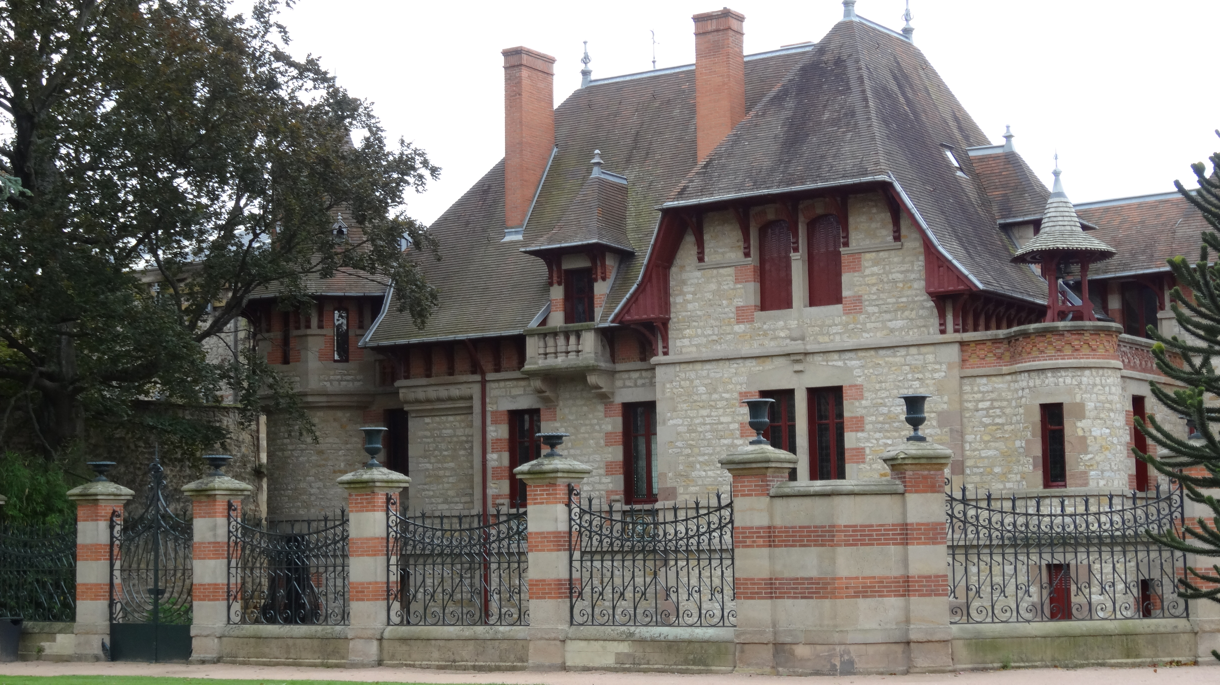 Maison Mantin - Musée Anne-de-Beaujeu. Moulins, Allier